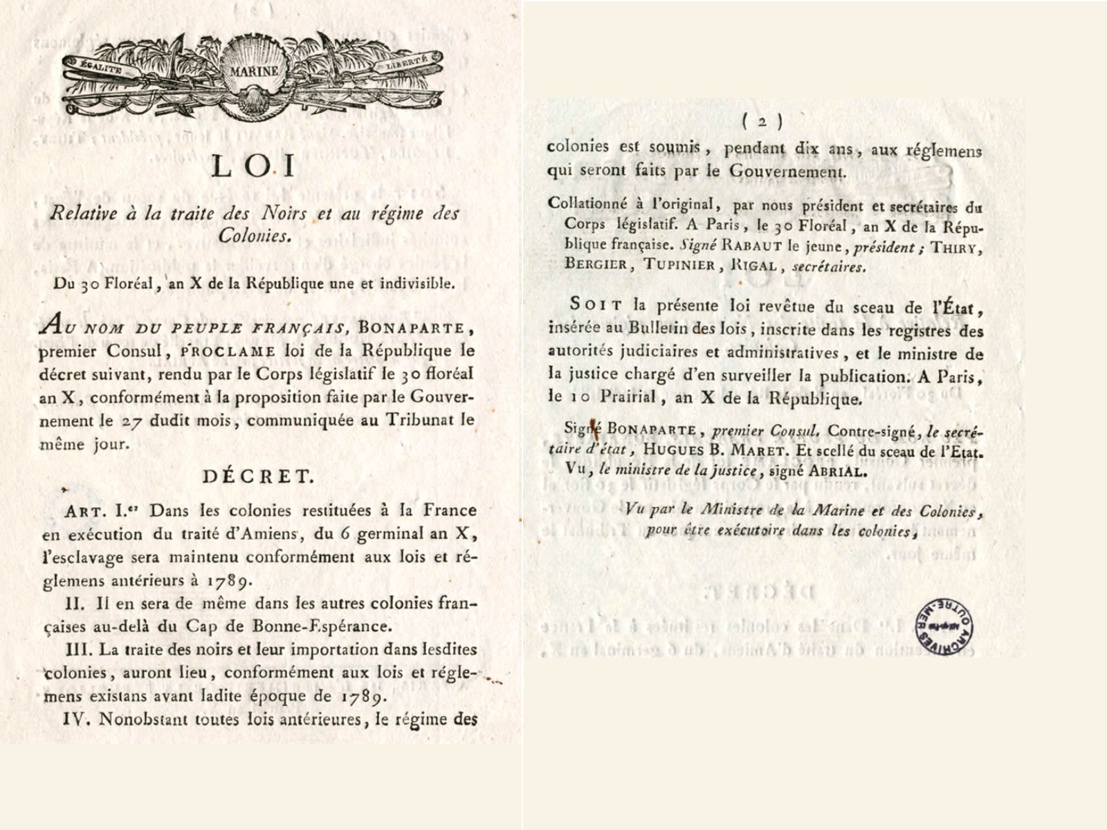 France, Bonaparte, premier consul.- Loi relative la traite des noirs et au régime des colonies, 30 Floreal An X (1802) de la République une et indivisible. La loi du 30 Floreal An X (1802) rétablit l'esclavage dans les colonies rendues à la France ainsi que dans les colonies au-delà du Cap de Bonne-Espérance, conformément aux lois et réglements antérieurs à 1789. Référence Irel ANOM : ark:/61561/ni258zyt